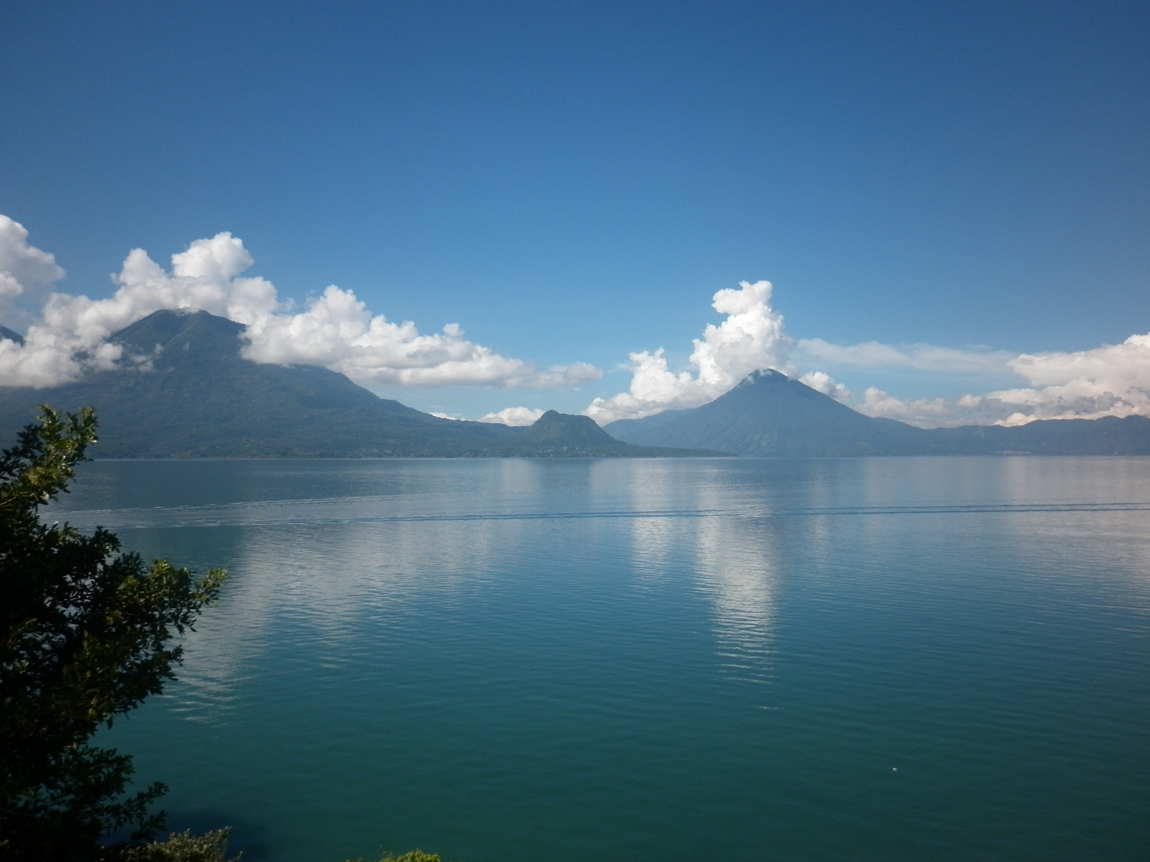 Una Mañana en San Antonio Palopó, Sololá. Visite y presencia un paisaje unico, del lago más bello del mundo, el lago de atitlan.